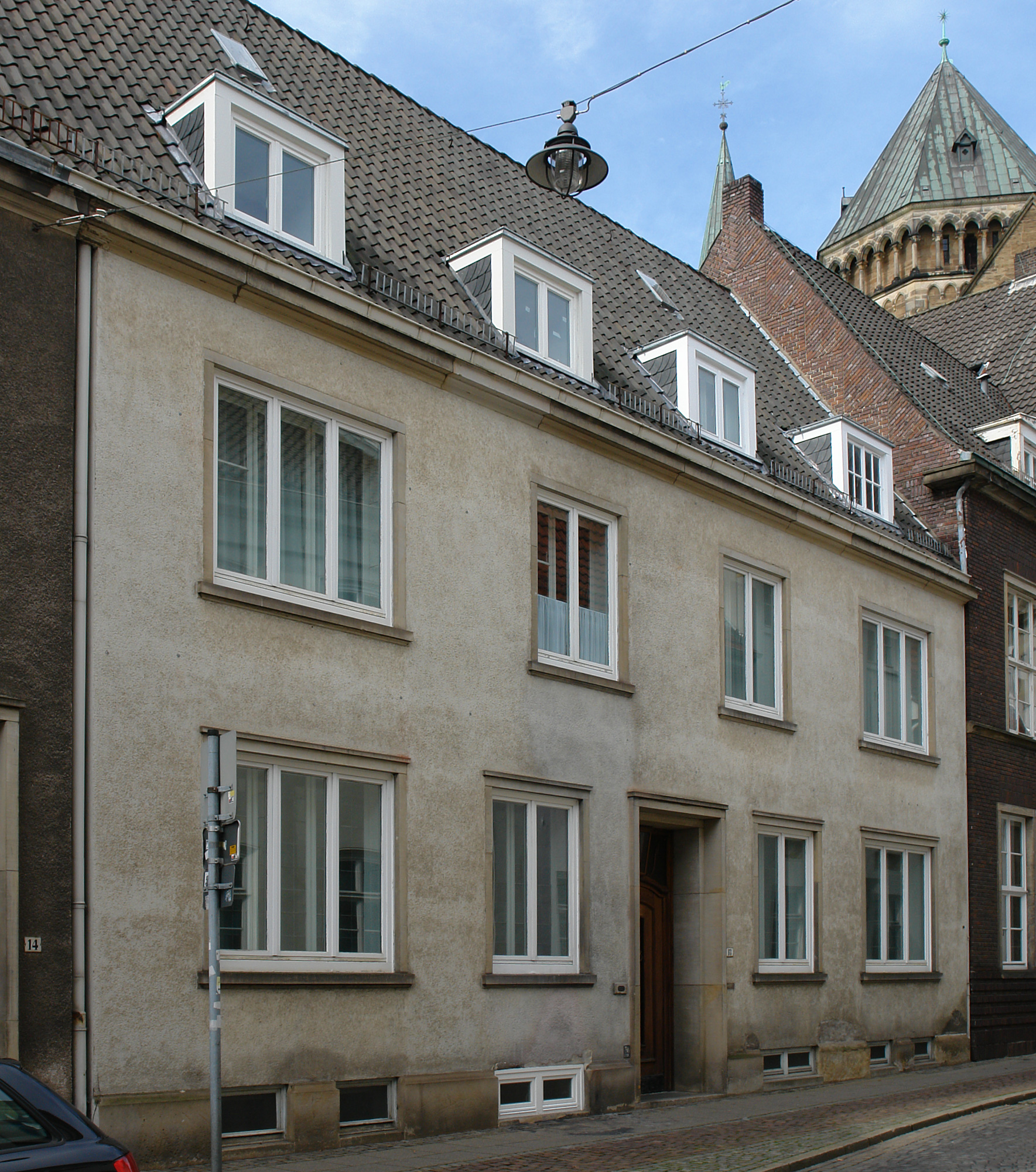 Predigerhaus der Domgemeinde in Bremen, Sandstraße 13.Das abgebildete Objekt ist ein geschütztes Kulturdenkmal in der Freien Hansestadt Bremen, mit der Nr. 0181 beim Landesamt für Denkmalpflege registriert.